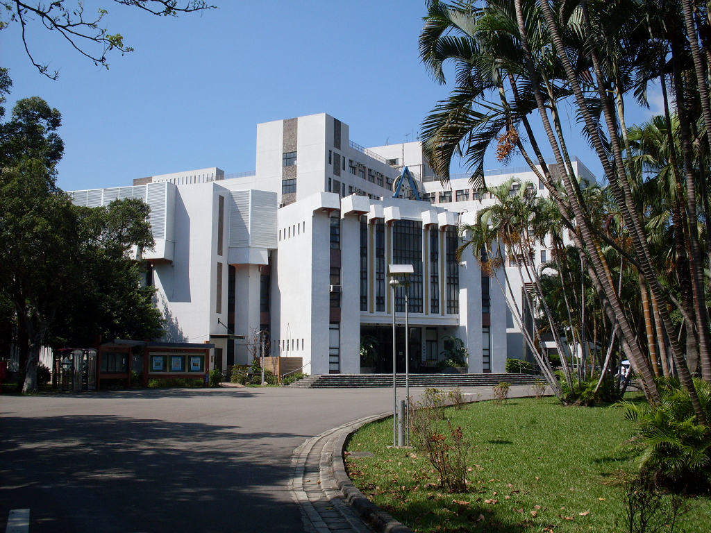 輔大淨心堂Immaculate Conception Chapel